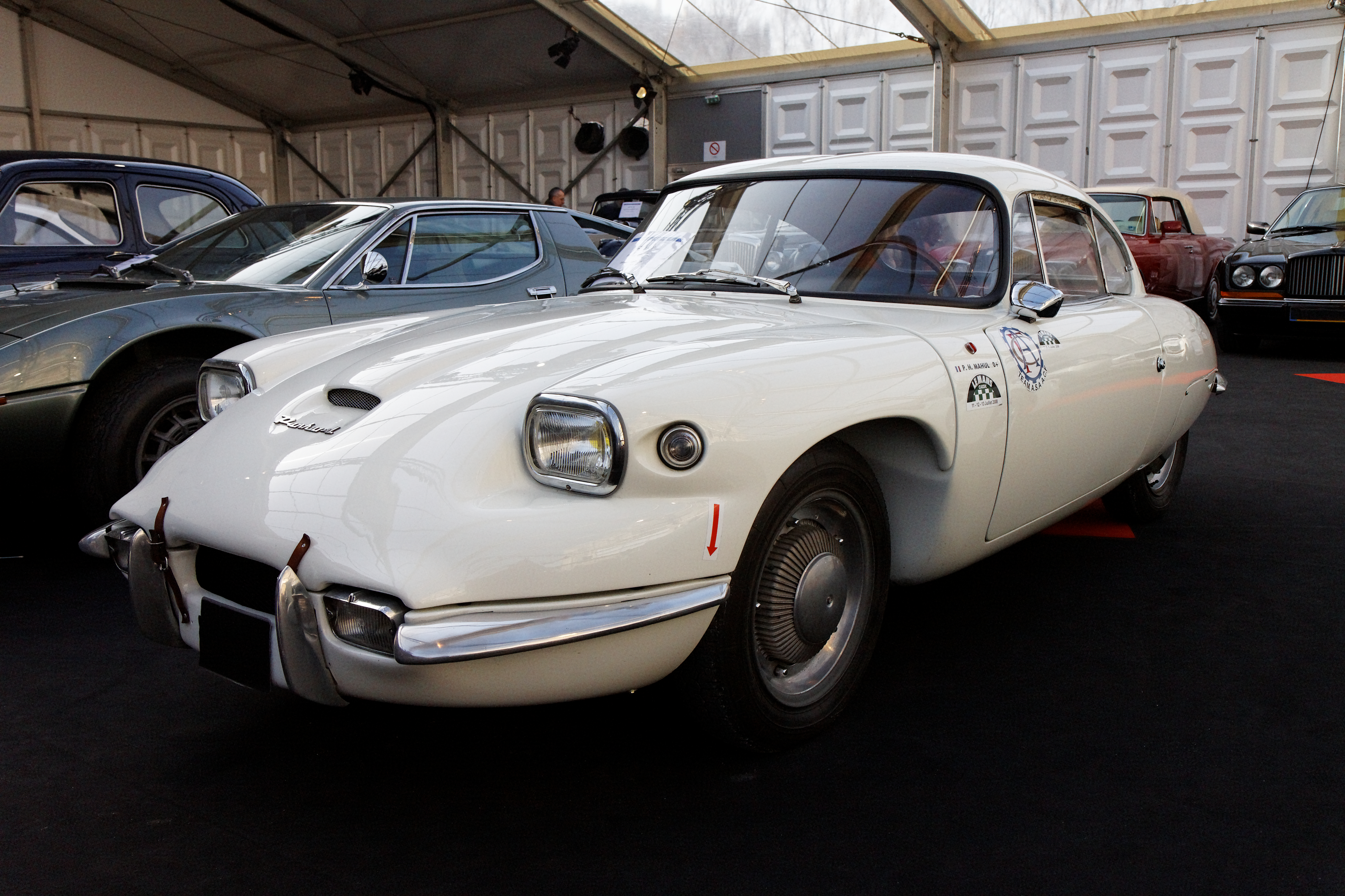 Panhard CD - Festival Automobile International 2011 - Vente aux enchères